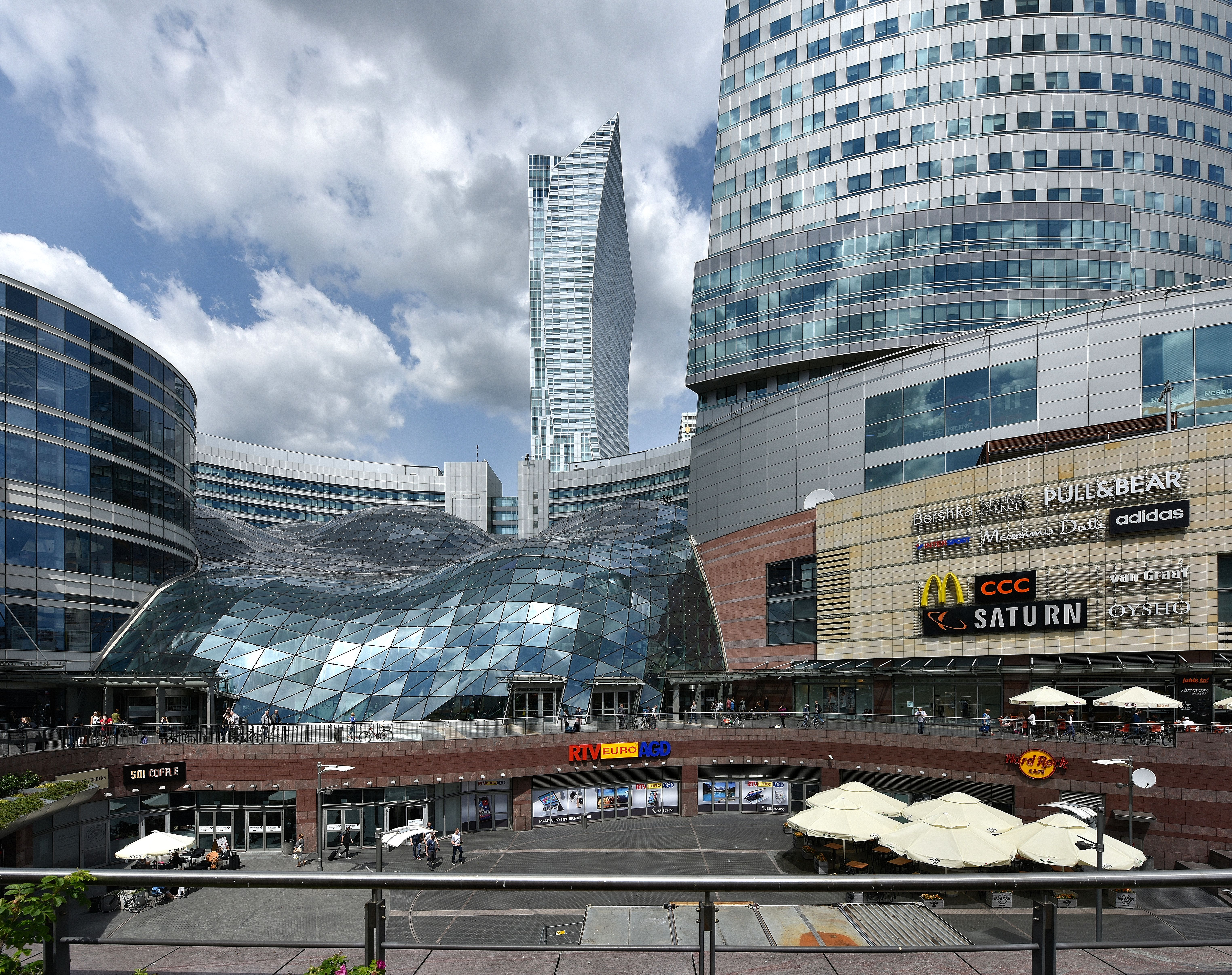 Centrum Handlowe Złote Tarasy w Warszawie